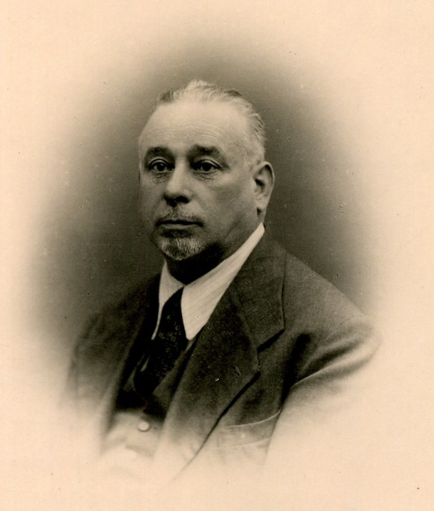 Il cavalier Carlo Azimonti.